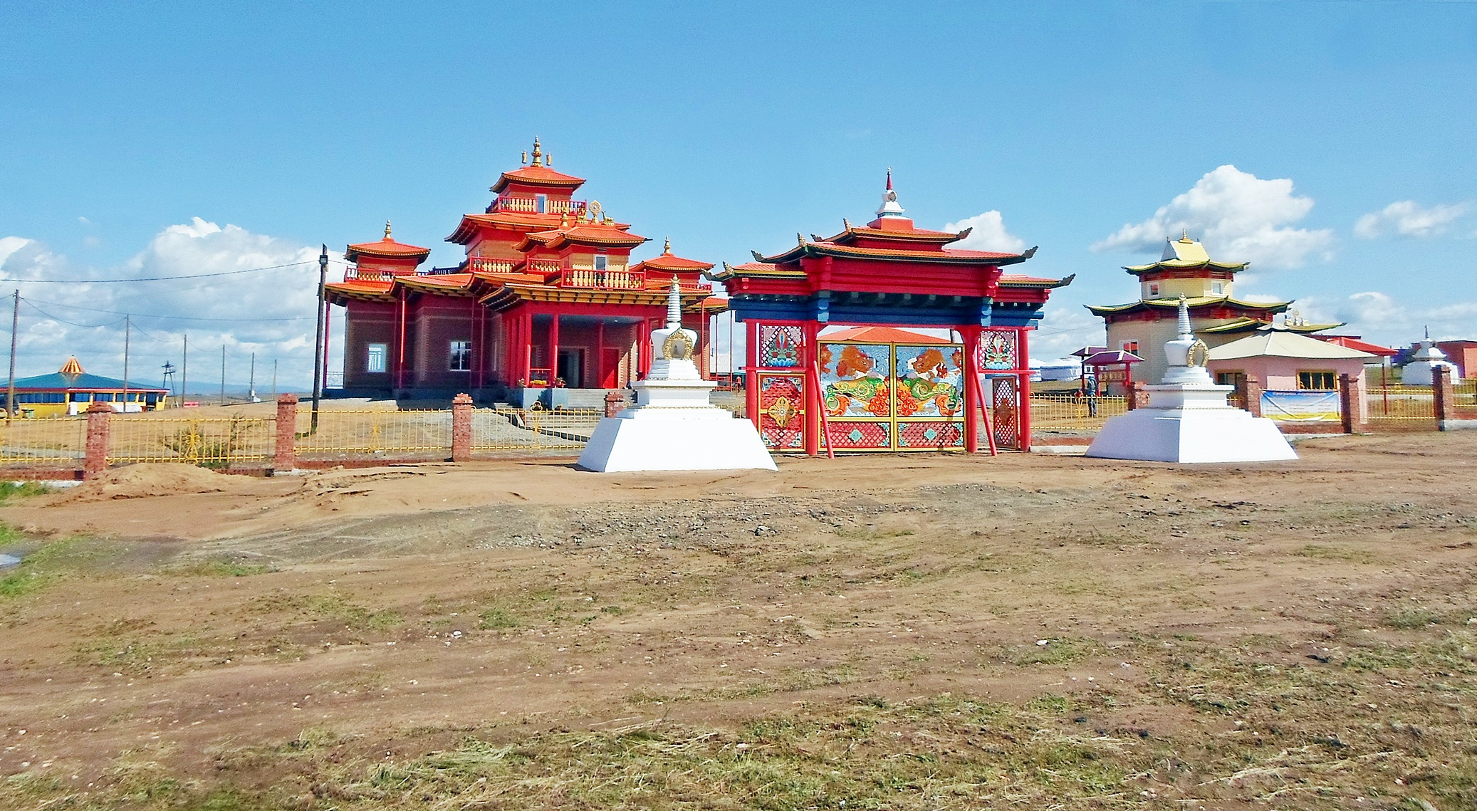 Загустайский дацан после открытия Цогчен-дугана. 23 августа 2019 года.